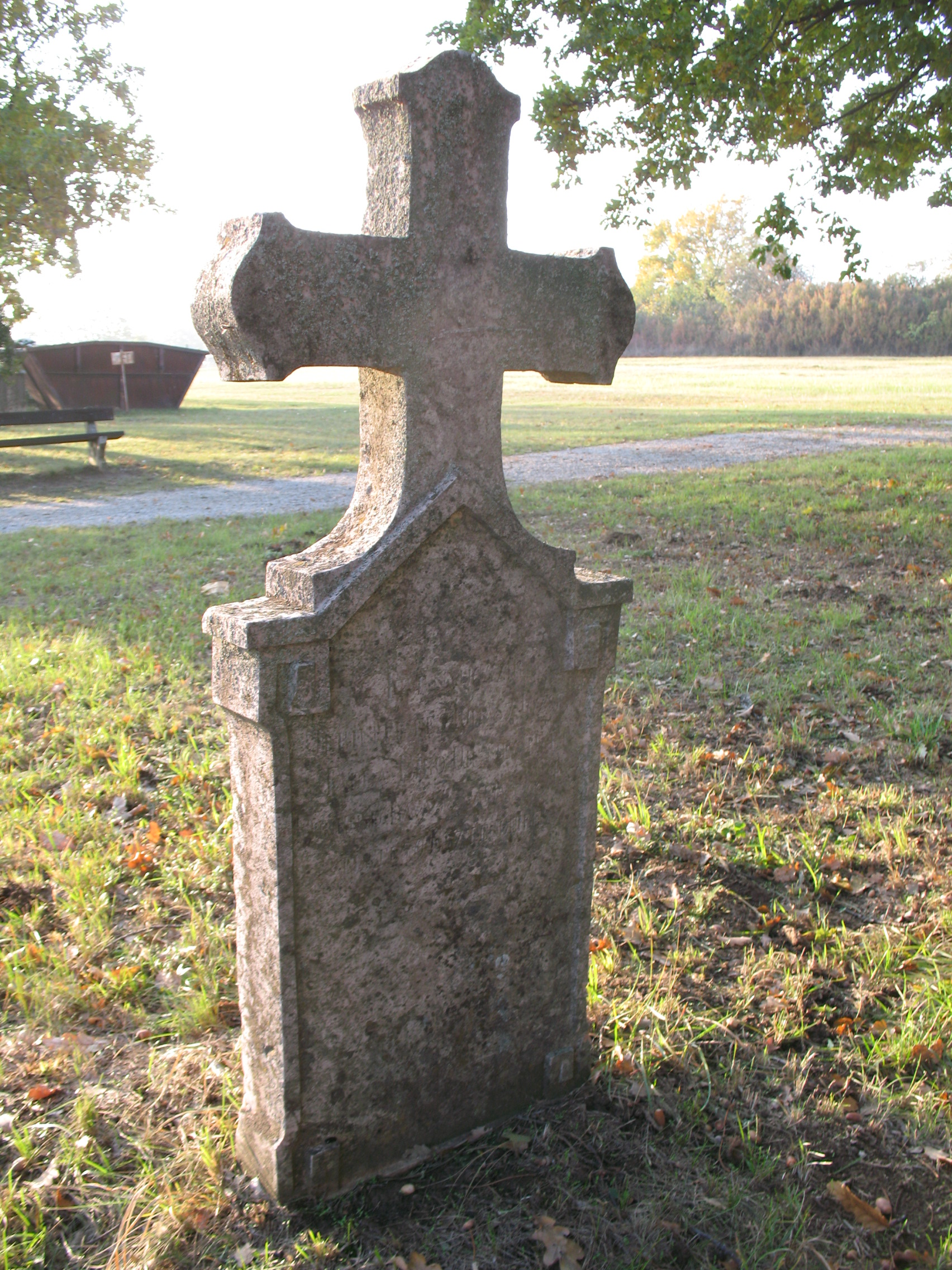 Nemespann temető Juhász József táblabíró 1759-1829